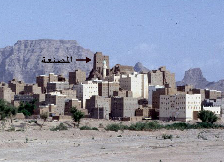 صورة قديمة تظهر المصنعة مقر السلاطين آل عبدالواحد في مدينة حبان.